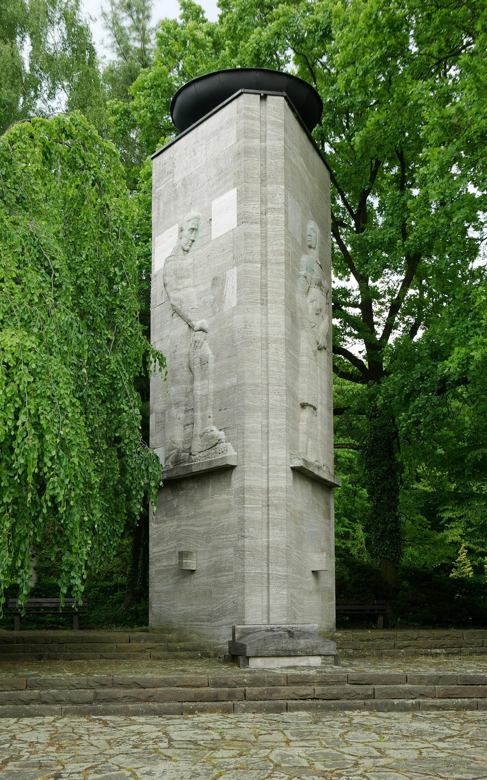 Gedenkstätte für die Opfer des Grubenunglücks auf Schacht Grimberg 3/4, Bergkamen, Nordrhein-Westfalen